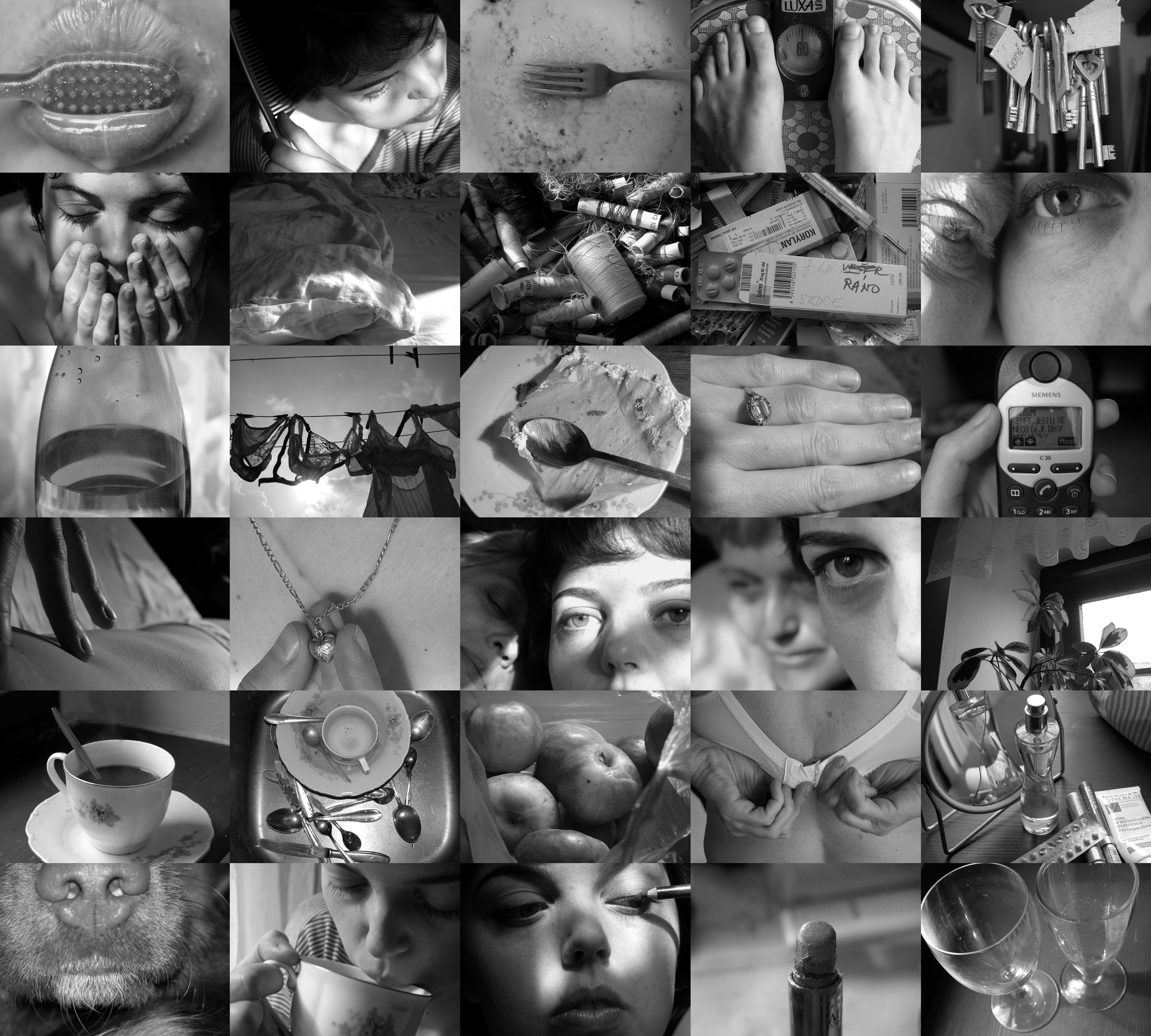 Věra Stuchelová´s photographs, cyklus Soukromý prostor